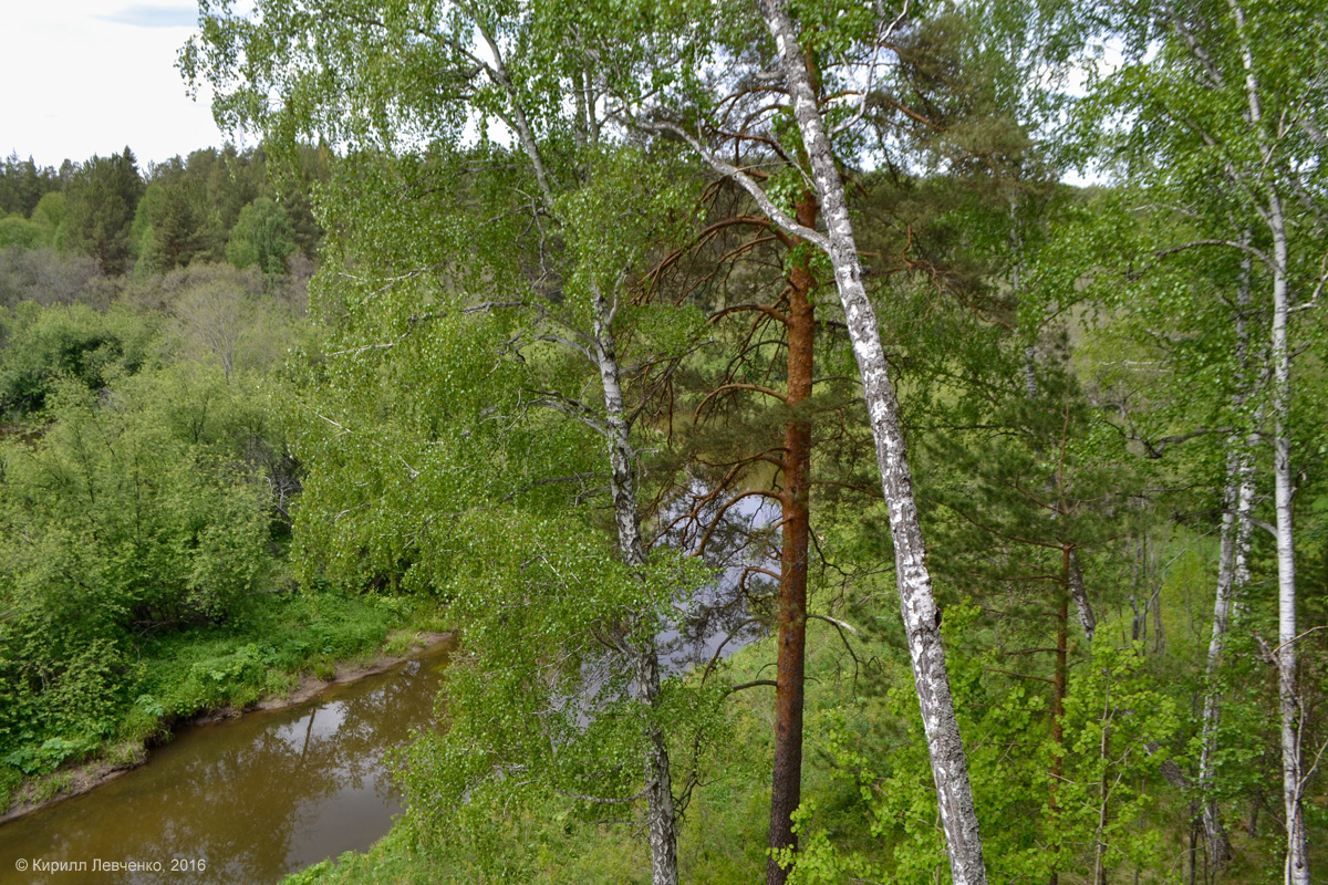 Река Западная Чусовая